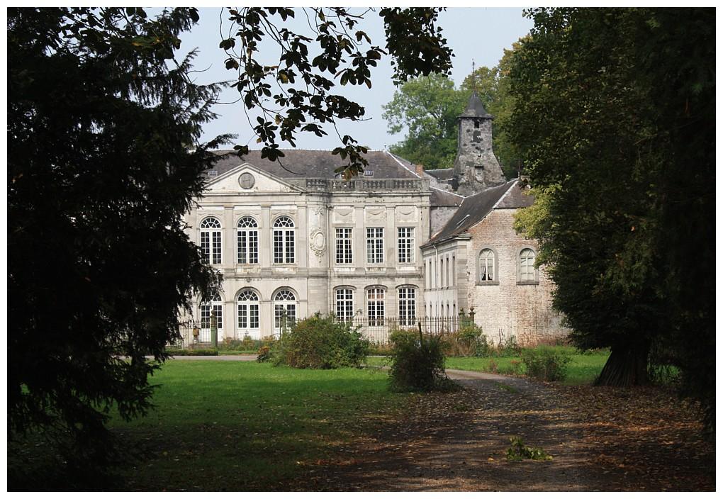 Kasteel Hasselbroek, Jeuk